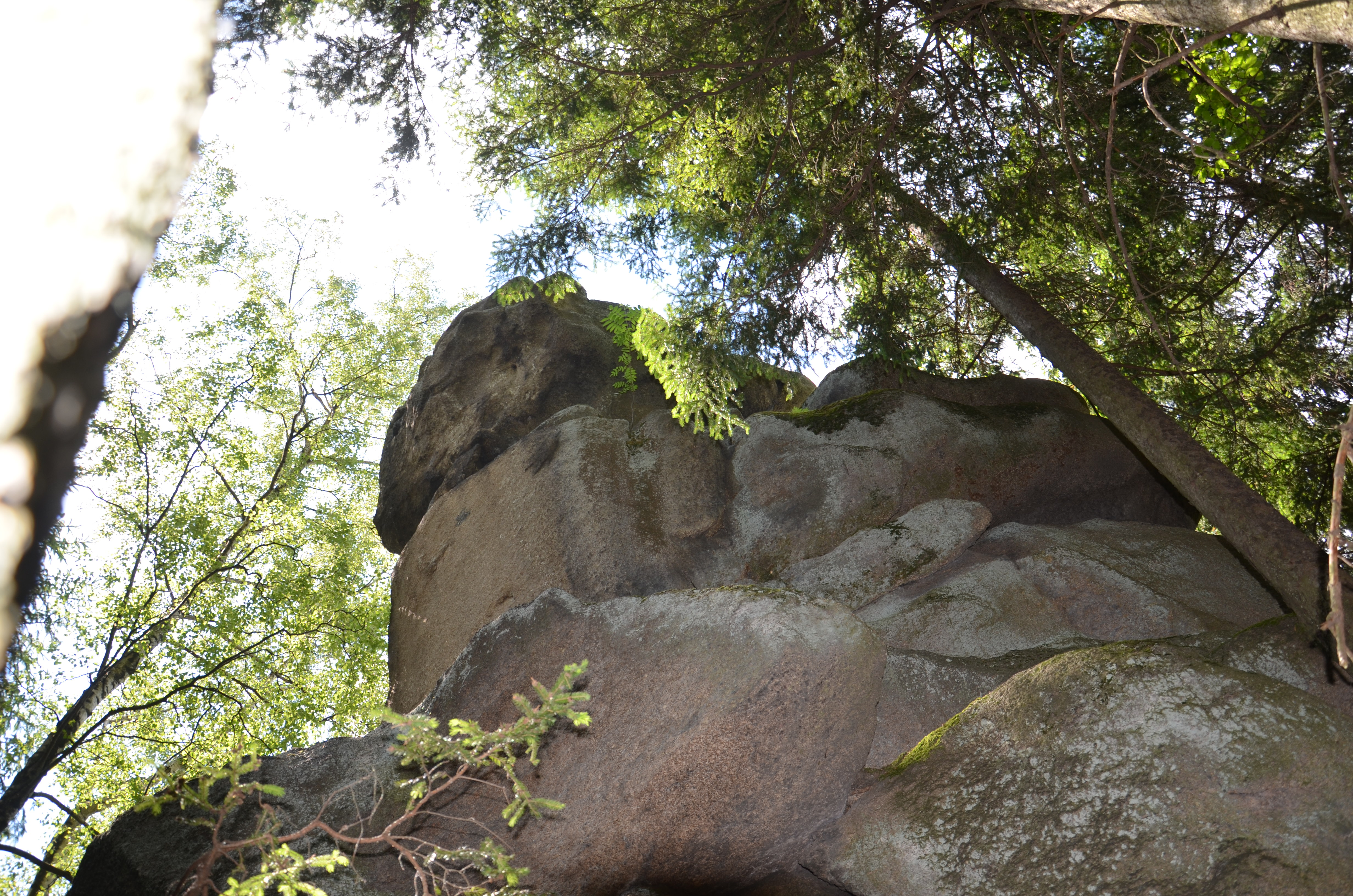 Strużnickie skały przy szlaku